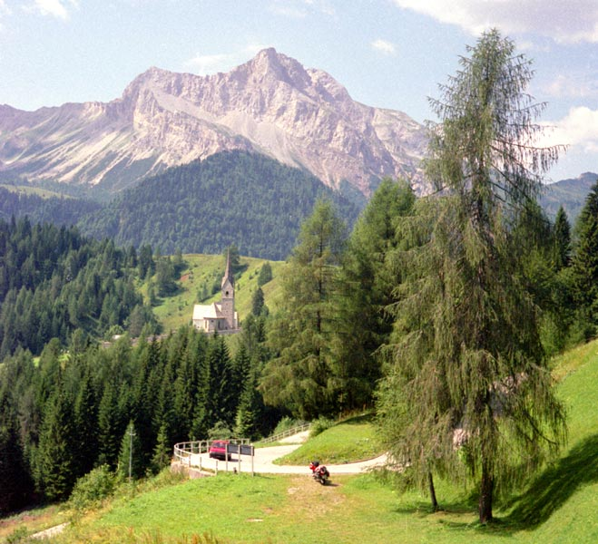 Il Monte Bìvera presso Sauris